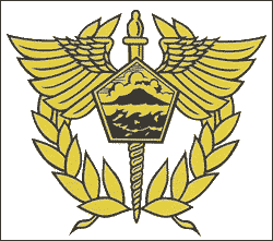 Logo Ditjen Bea Cukai